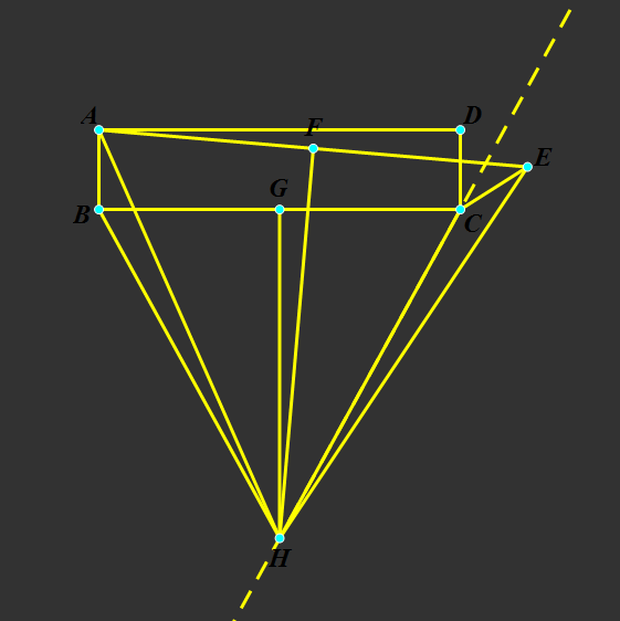 相对于上面一道题来讲是正确的。